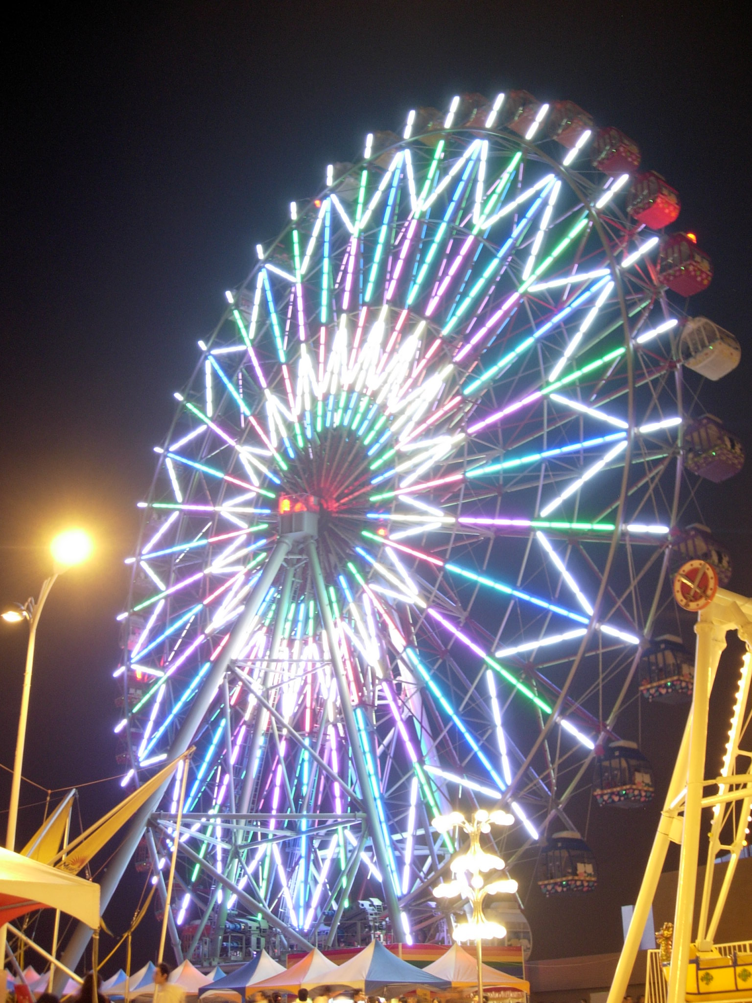 夢時代摩天輪